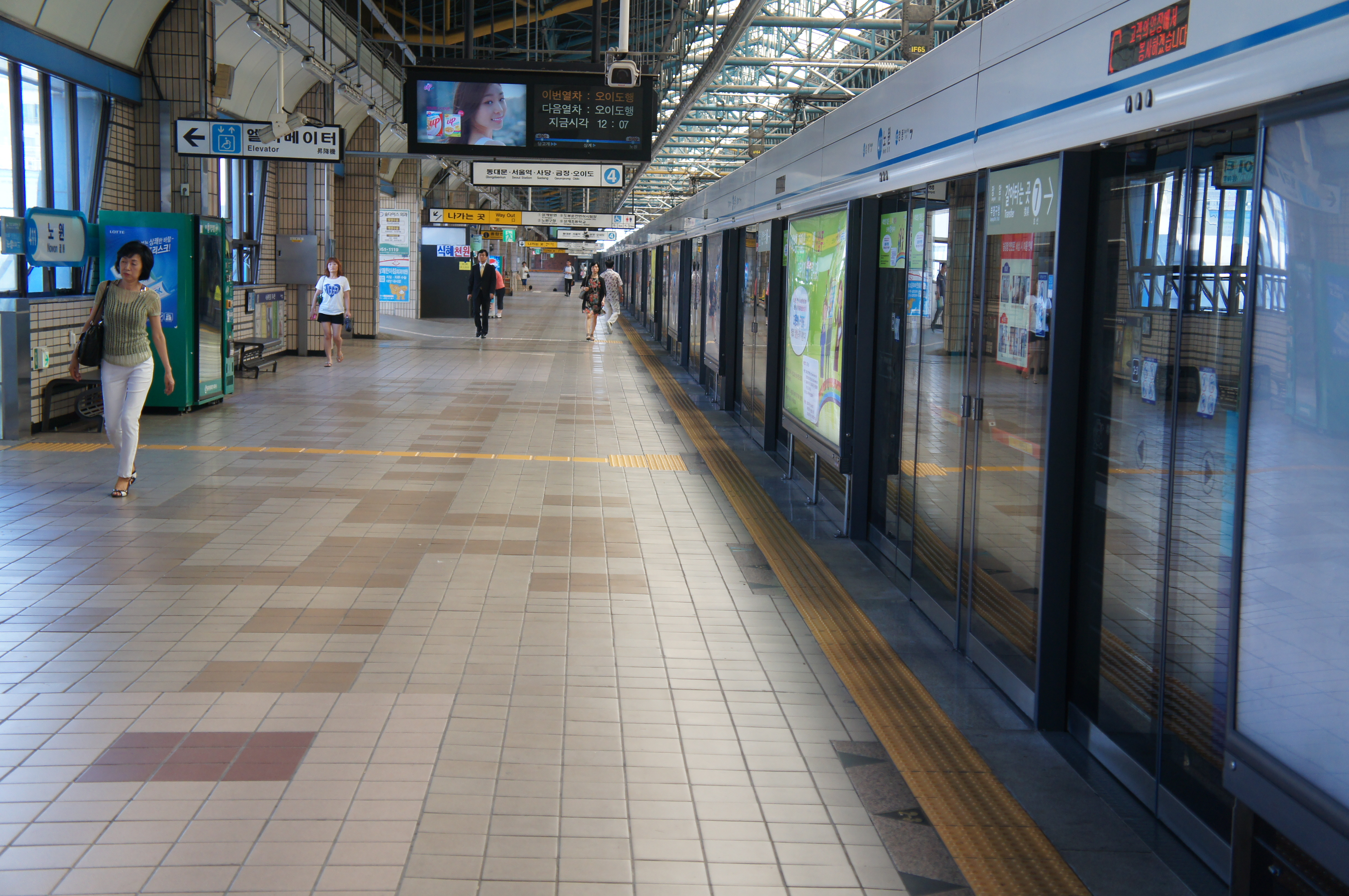 4호선 노원역 승강장